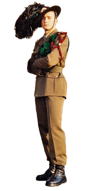 Bersaglieri - Caporalmaggiore Istruttore in grande uniforme invernale (14° Battaglione Sernaglia)